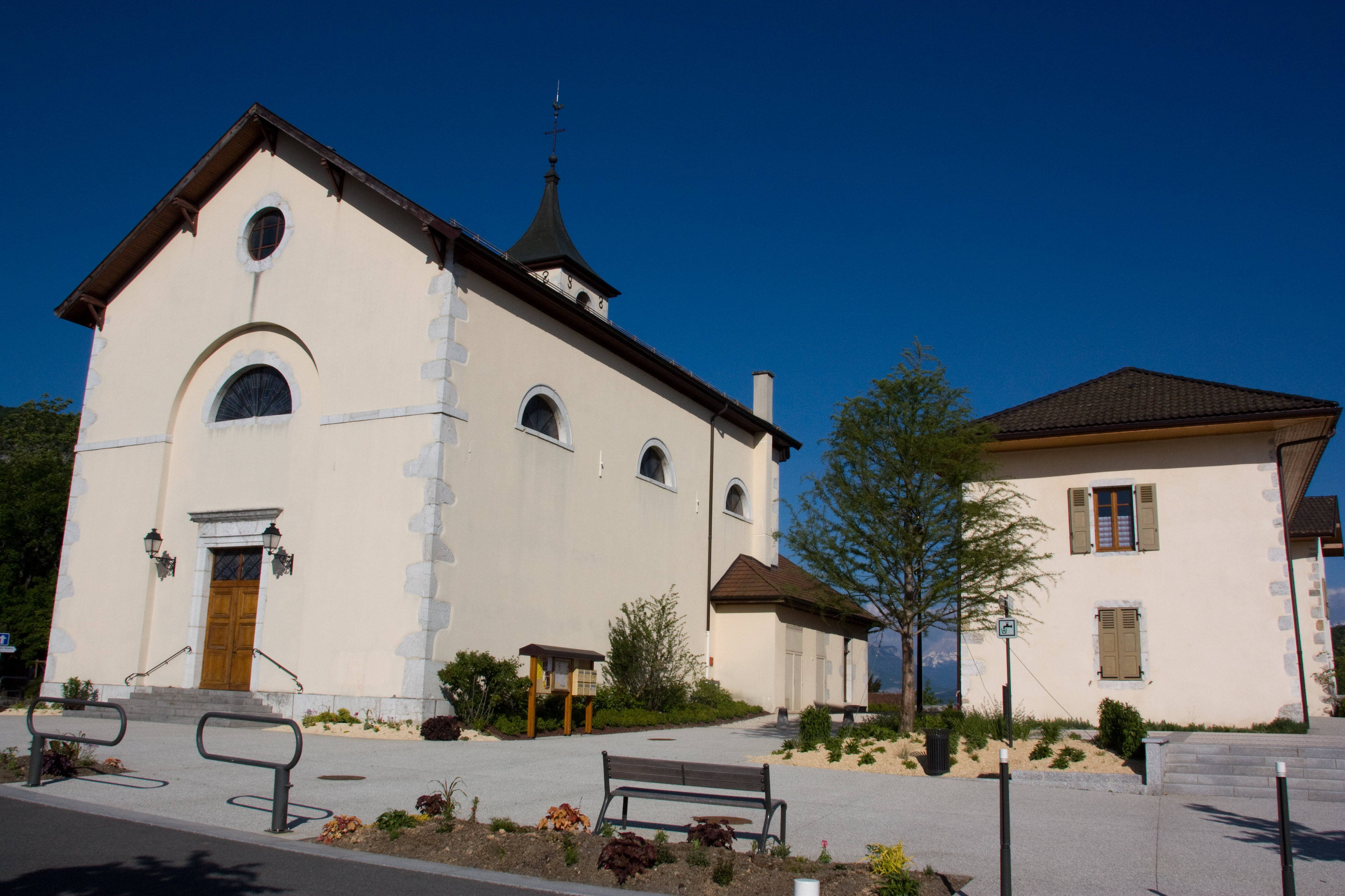 Eglise de Sillingy, Sillingy, Haute-Savoie, France